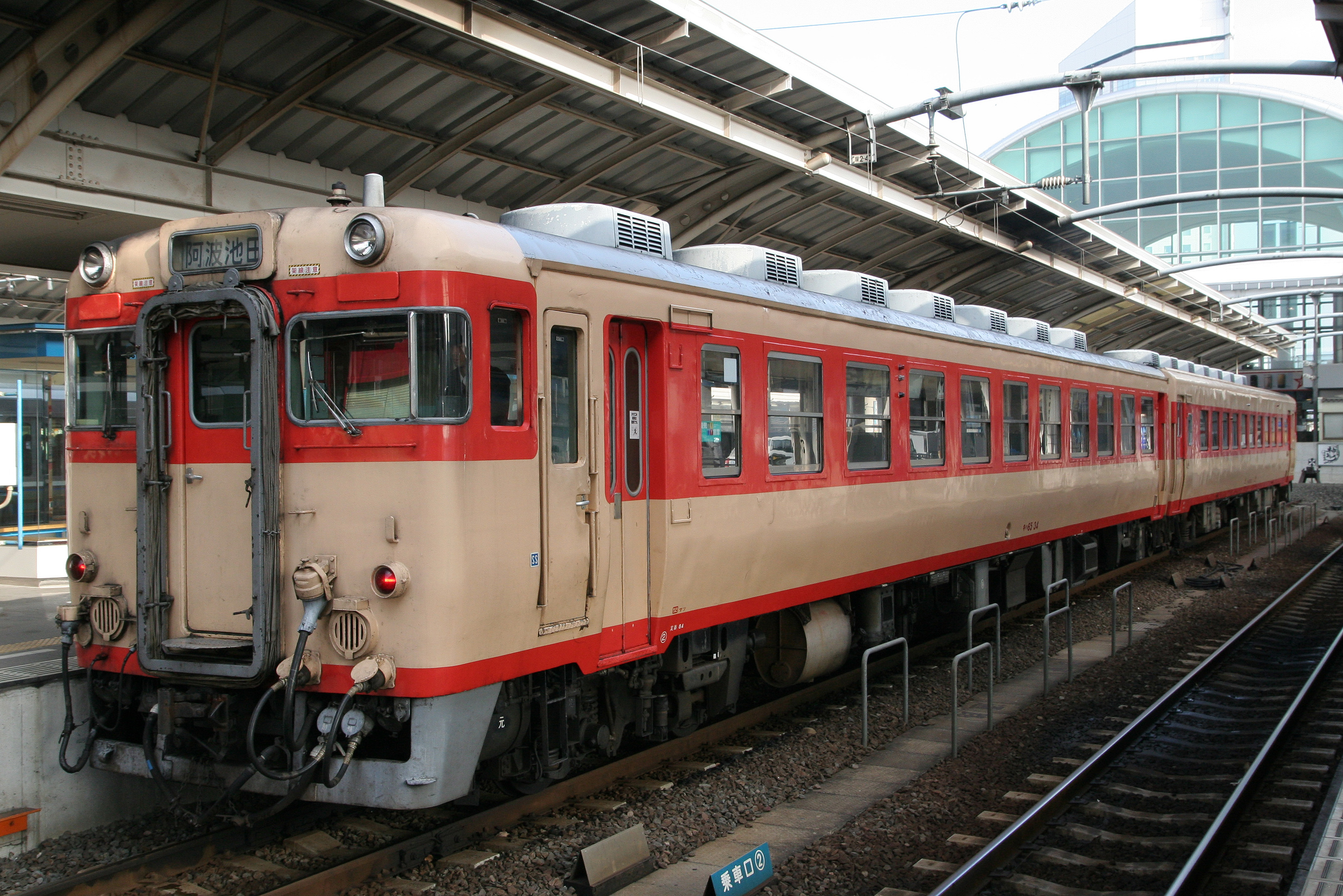 JR四国キハ65形34 国鉄色 高松駅